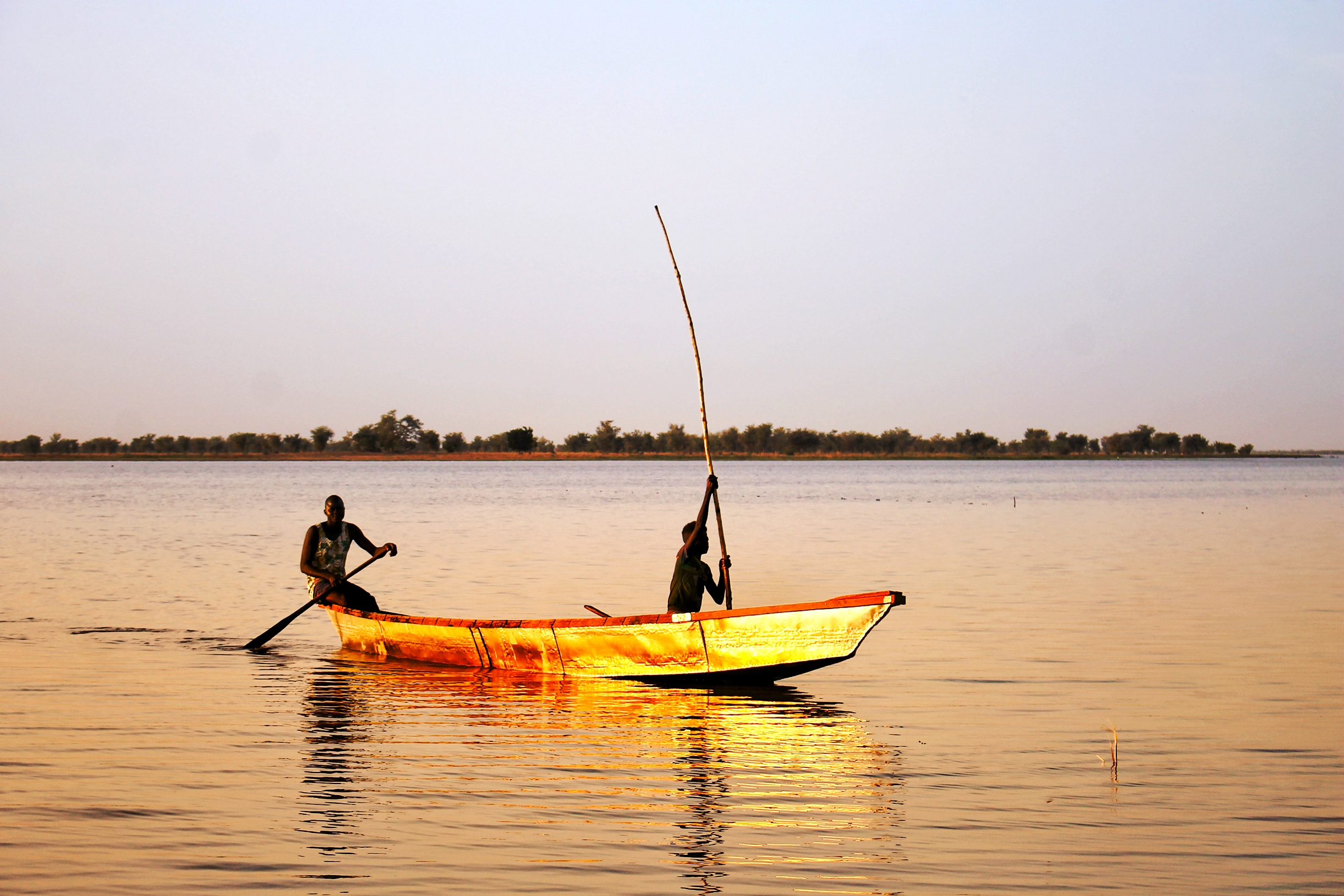 Lac de Guere. Arrondissement de Guere, département de mayo danay.